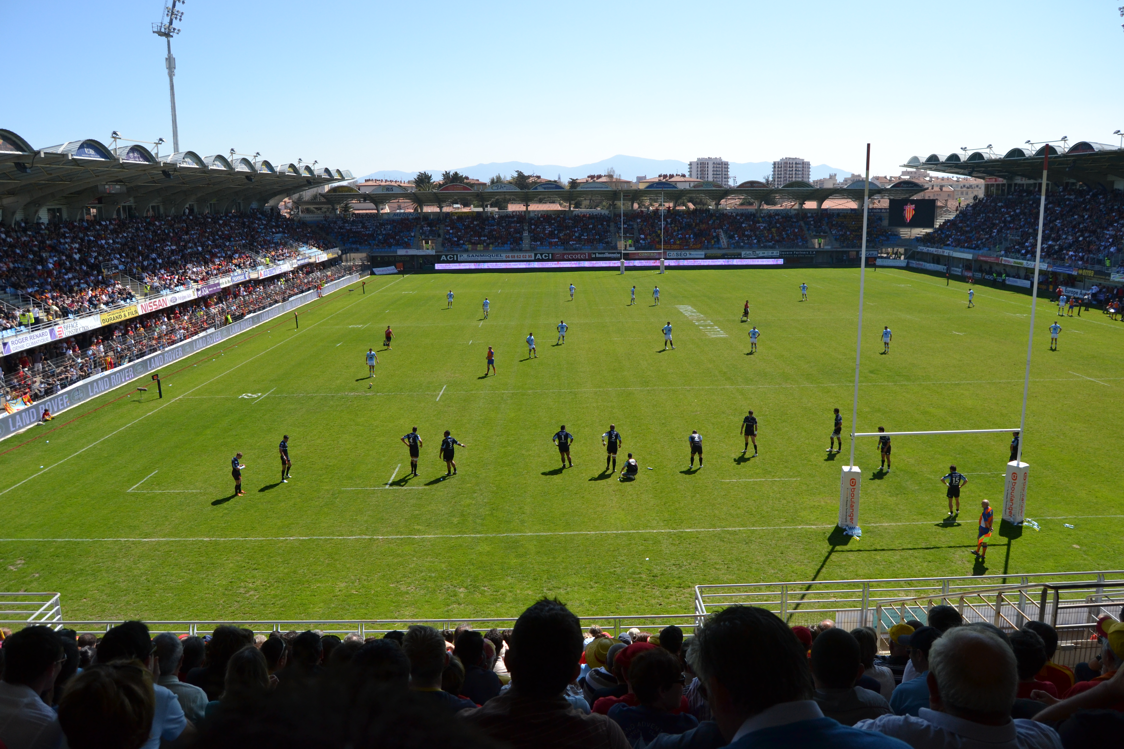 Stade Aimé Giral lors d'un match USAP-Aviron Bayonnais (2012)